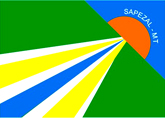 Bandeira_Sapezal_MT.jpg